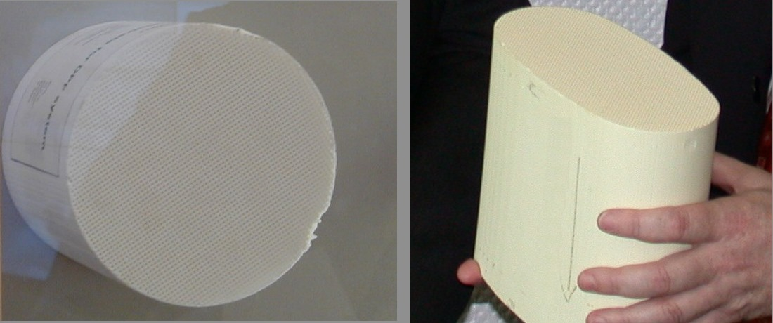 Dieselpartikelfilter (Monolith) links aus Cordierite-Keramik, rechts aus Alumunium-Titanat-Keramik